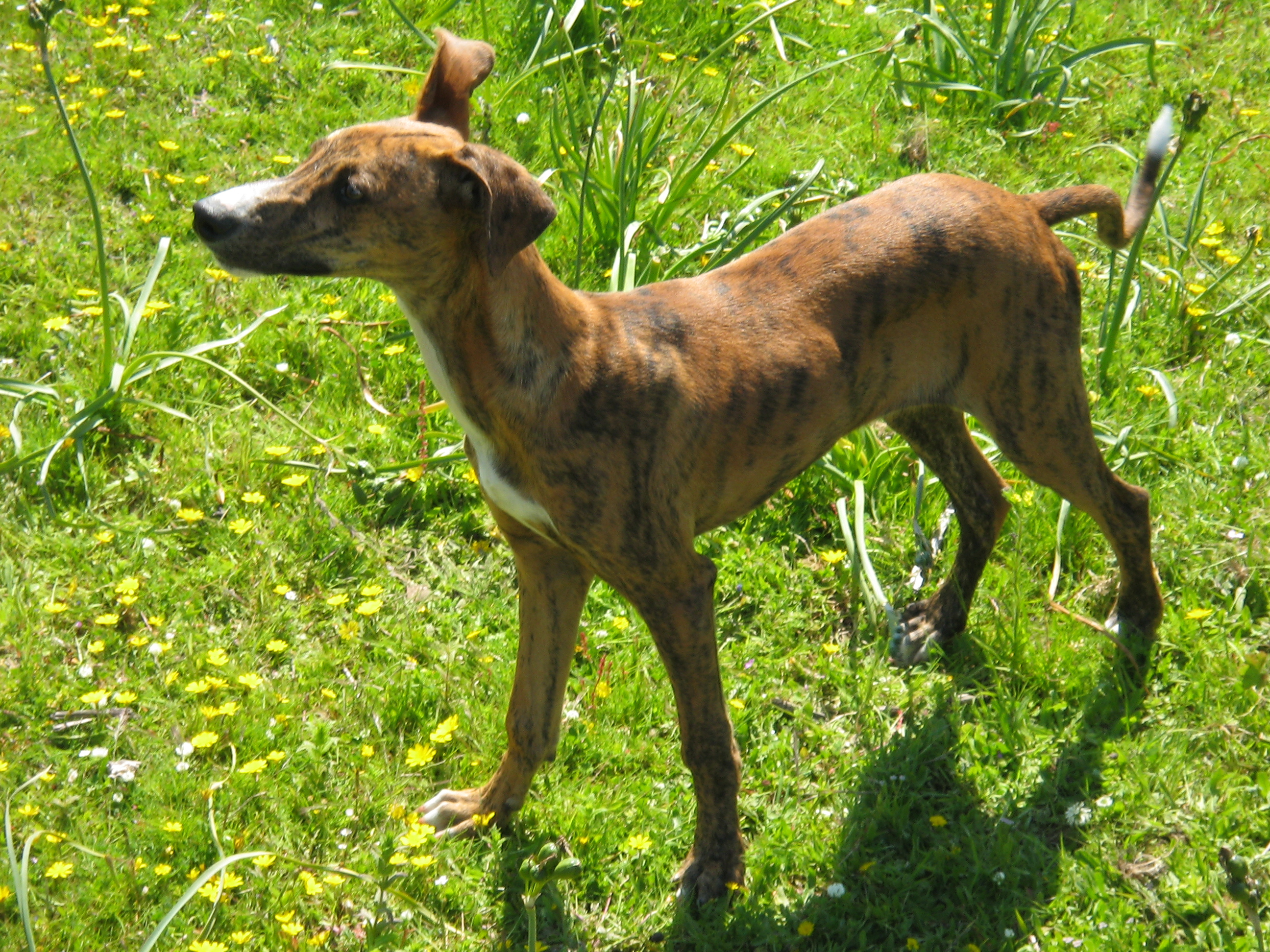 Galgo español cachorro/Spanish greyhound puppy